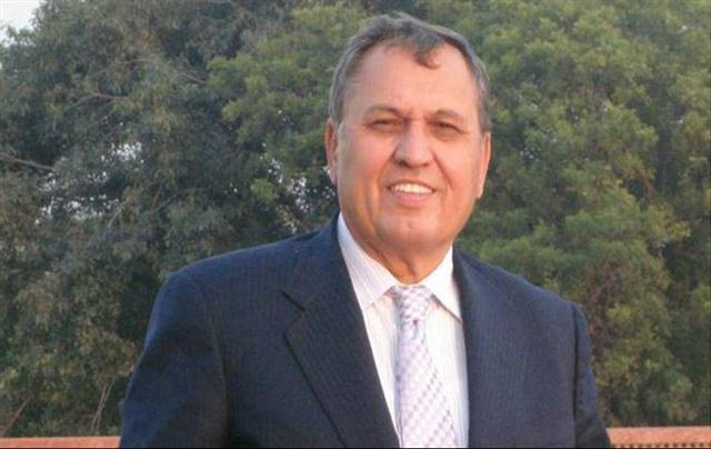 Huseyin OZDILEK 2012